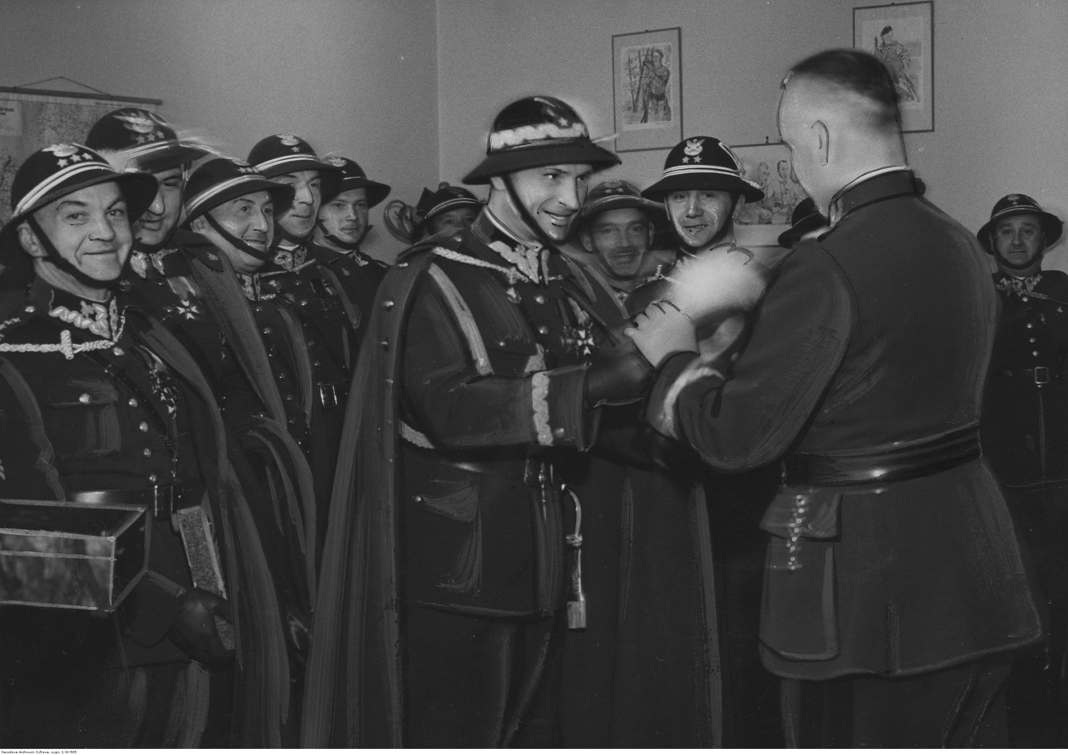 Wręczenie gen. Kazimierzowi Sosnkowskiemu srebrnych odznak pułkowych 22 Dywizji Piechoty Górskiej z peleryną i kapeluszem. Fragment uroczystości w Generalnym Inspektoracie Sił Zbrojnych - gen. Mieczysław Boruta-Spiechowicz wręcza kapelusz gen. Kazimierzowi Sosnkowskiemu. Koncern Ilustrowany Kurier Codzienny - Archiwum Ilustracji. Sygnatura: 1-W-505